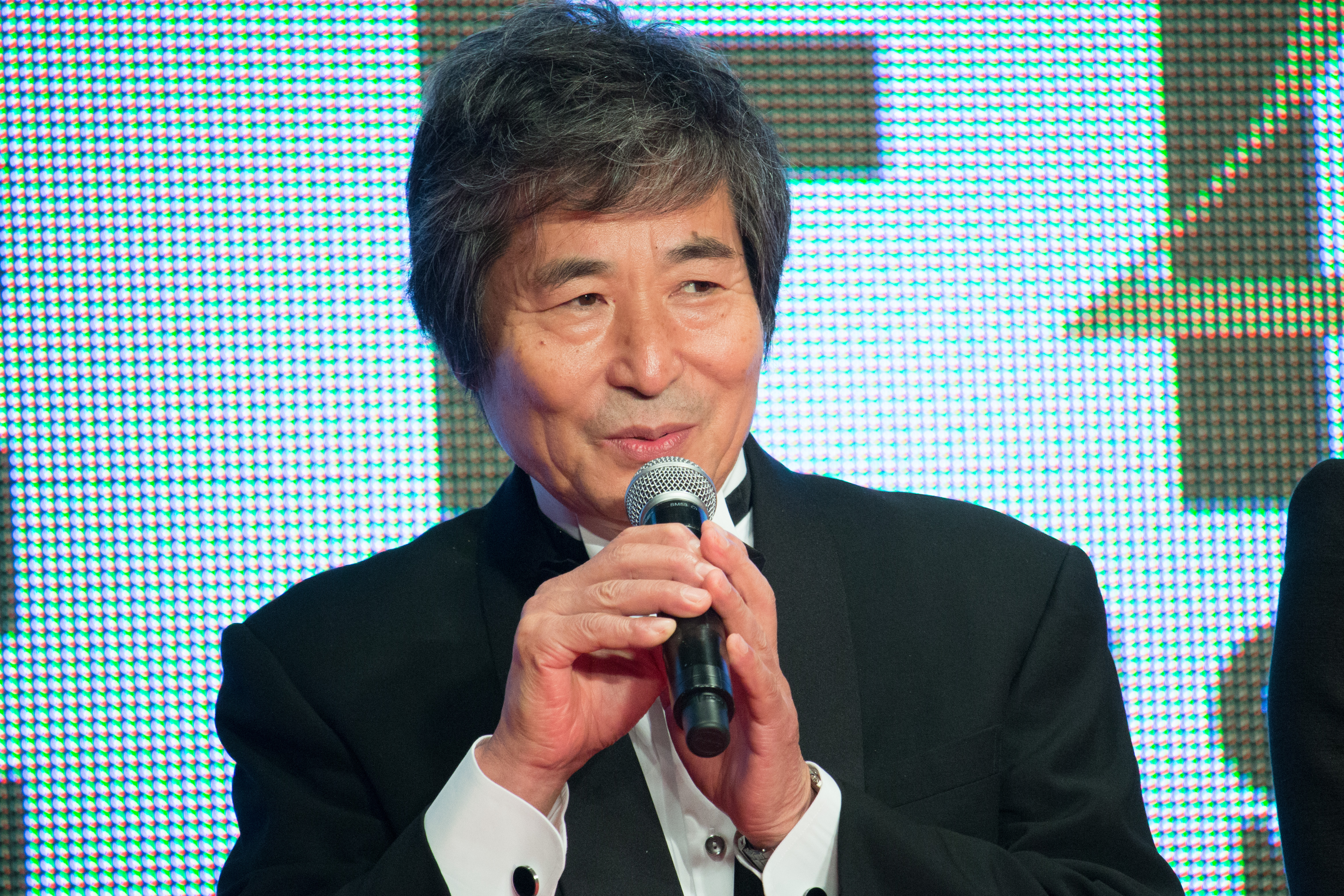 第28回 東京国際映画祭 オープニングセレモニー 小栗康平 (Foujita)